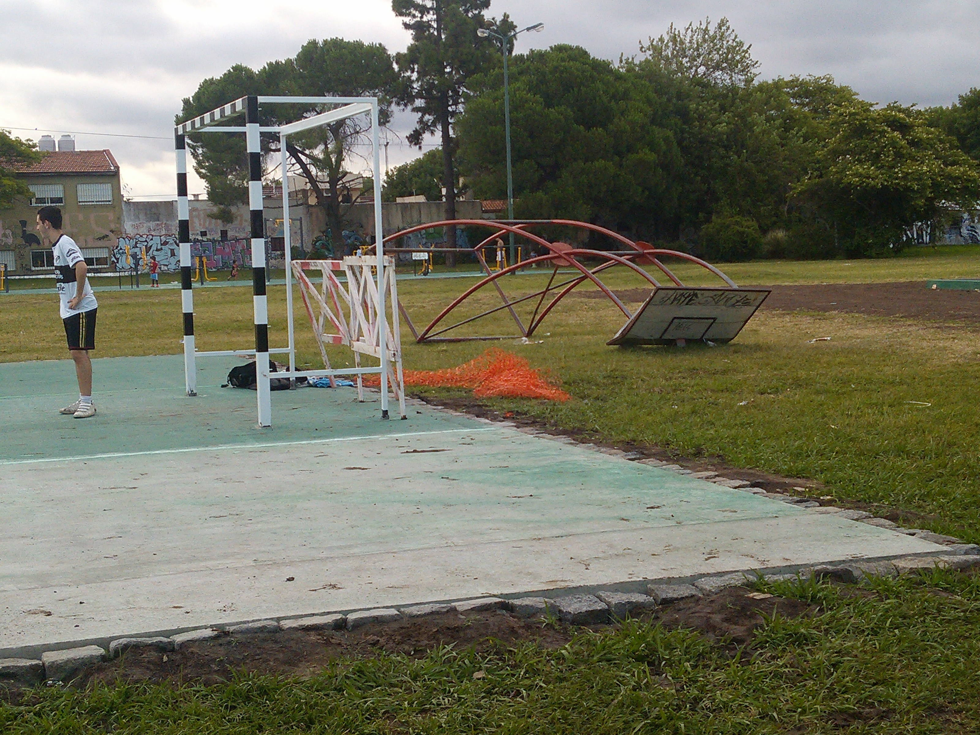 Los aros ya no están, las "jirafas" estan tiradas en el suelo